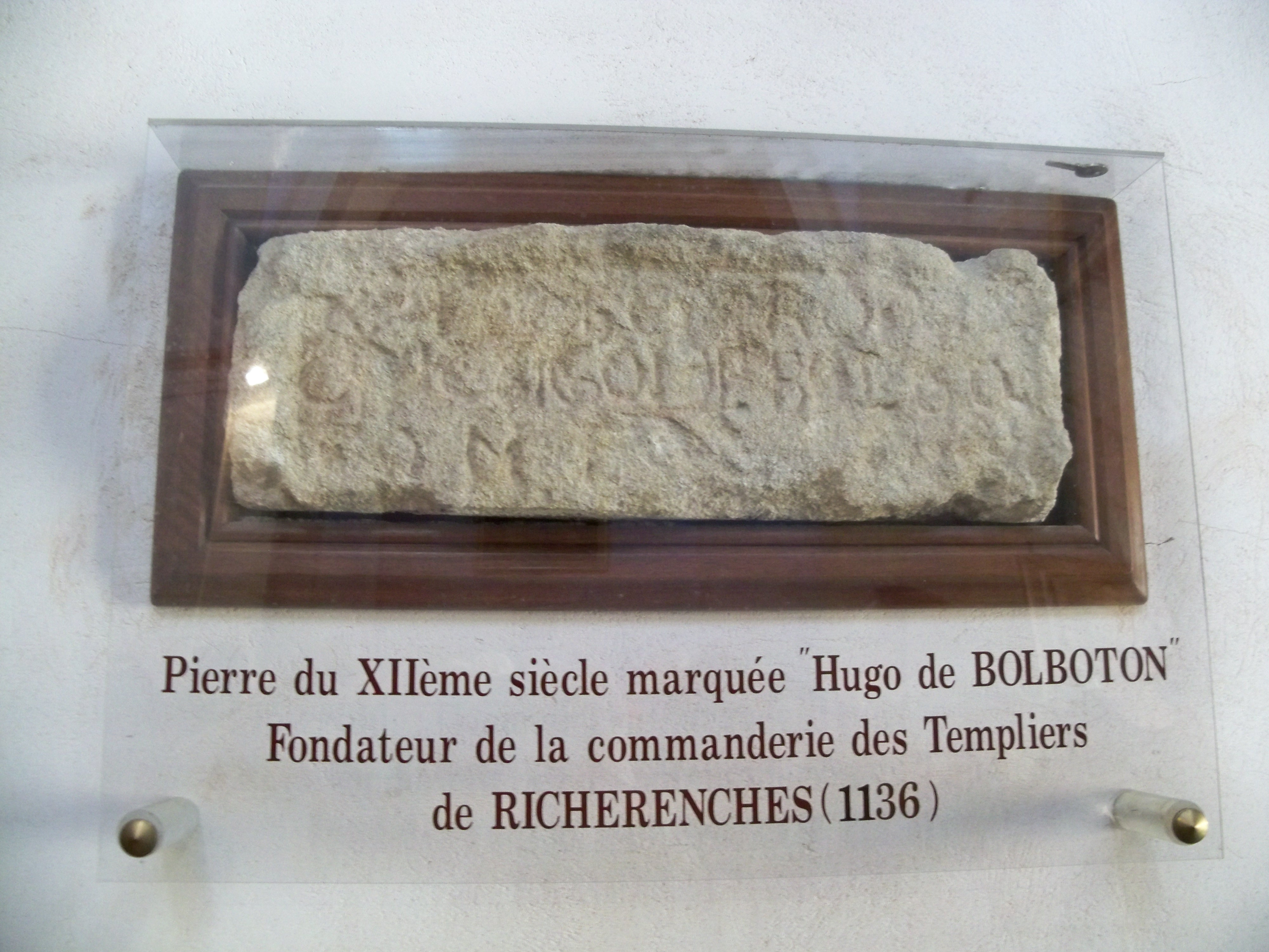 Pierre_-_Hugo_de_Bolboton, dans l'église de Richerenches, Vaucluse, France